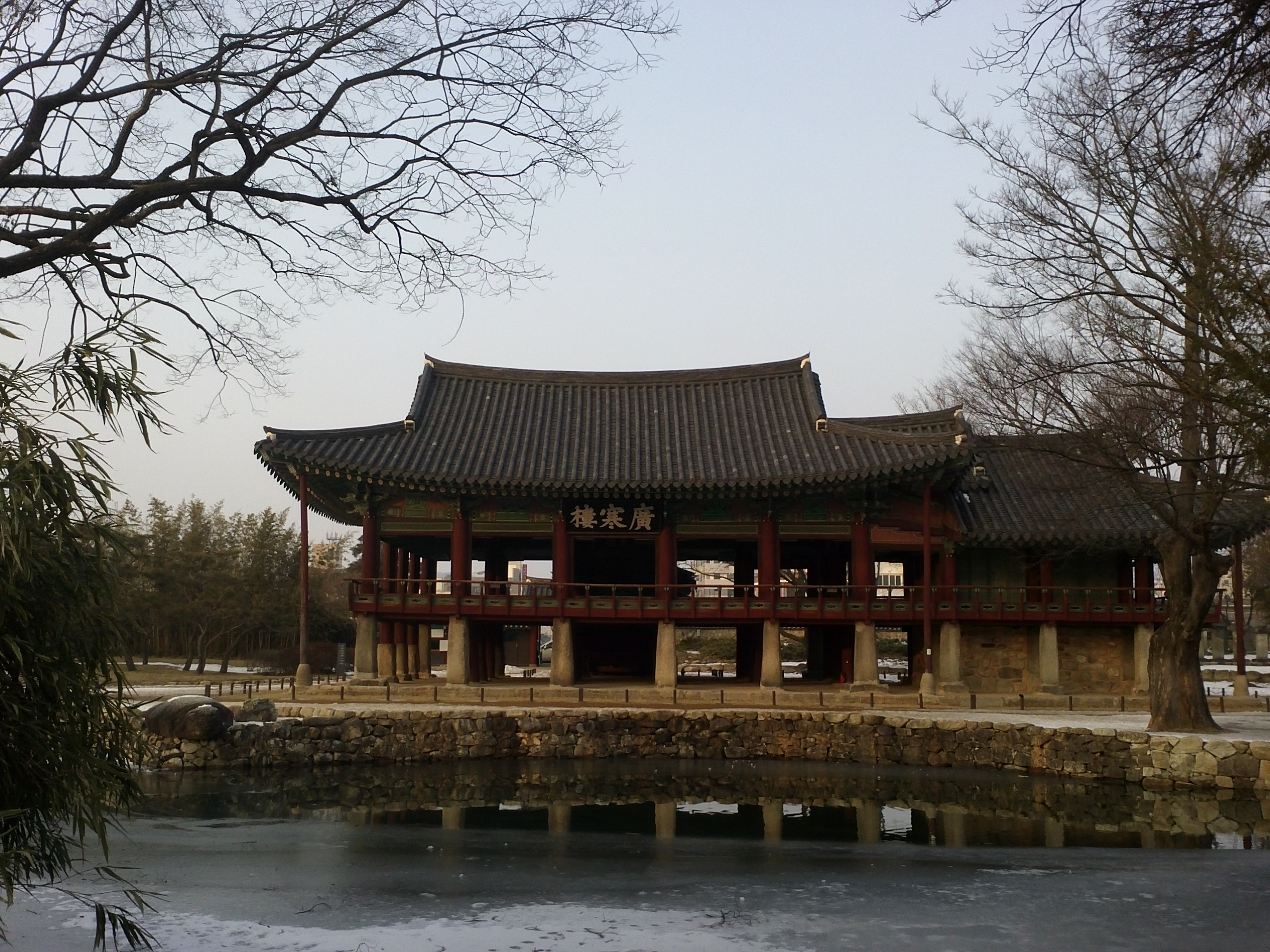 전라북도 남원 광한루2